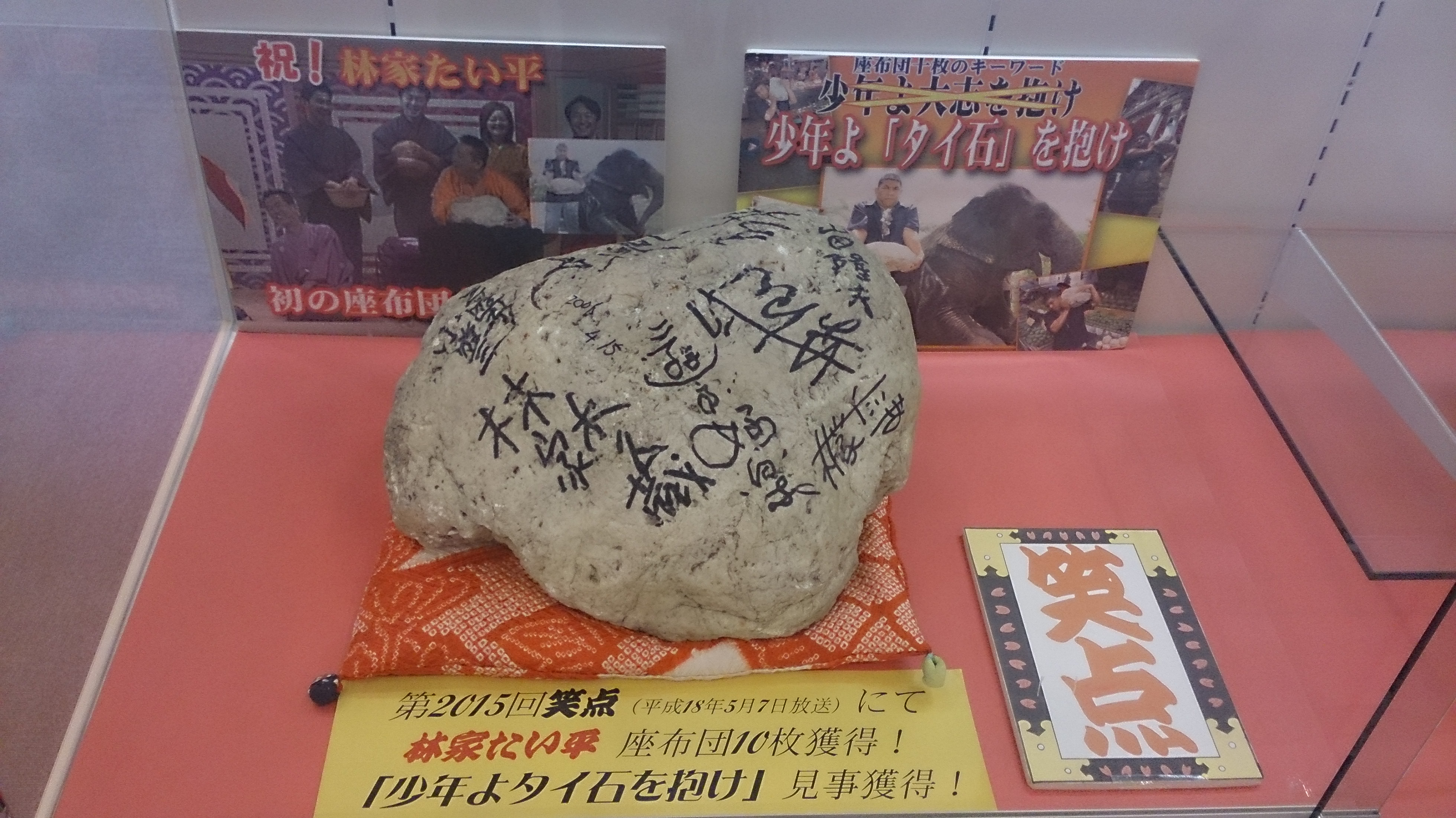 タイの石（林家たい平が本家『笑点』で座布団10枚を獲得した際の賞品）（横浜にぎわい座 2F）